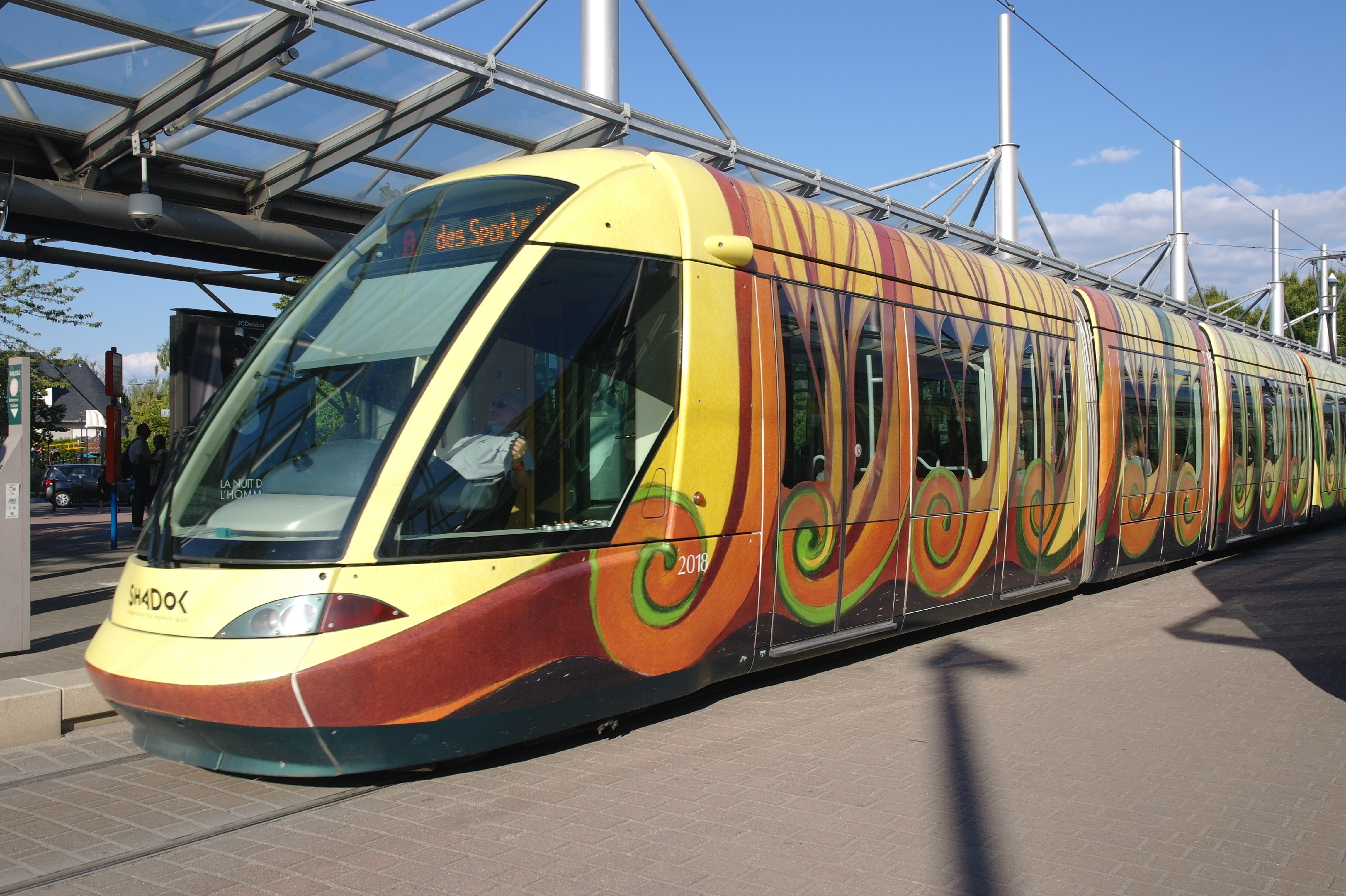 Un Tramway de Strasbourg habilé par Luc Schuiten.